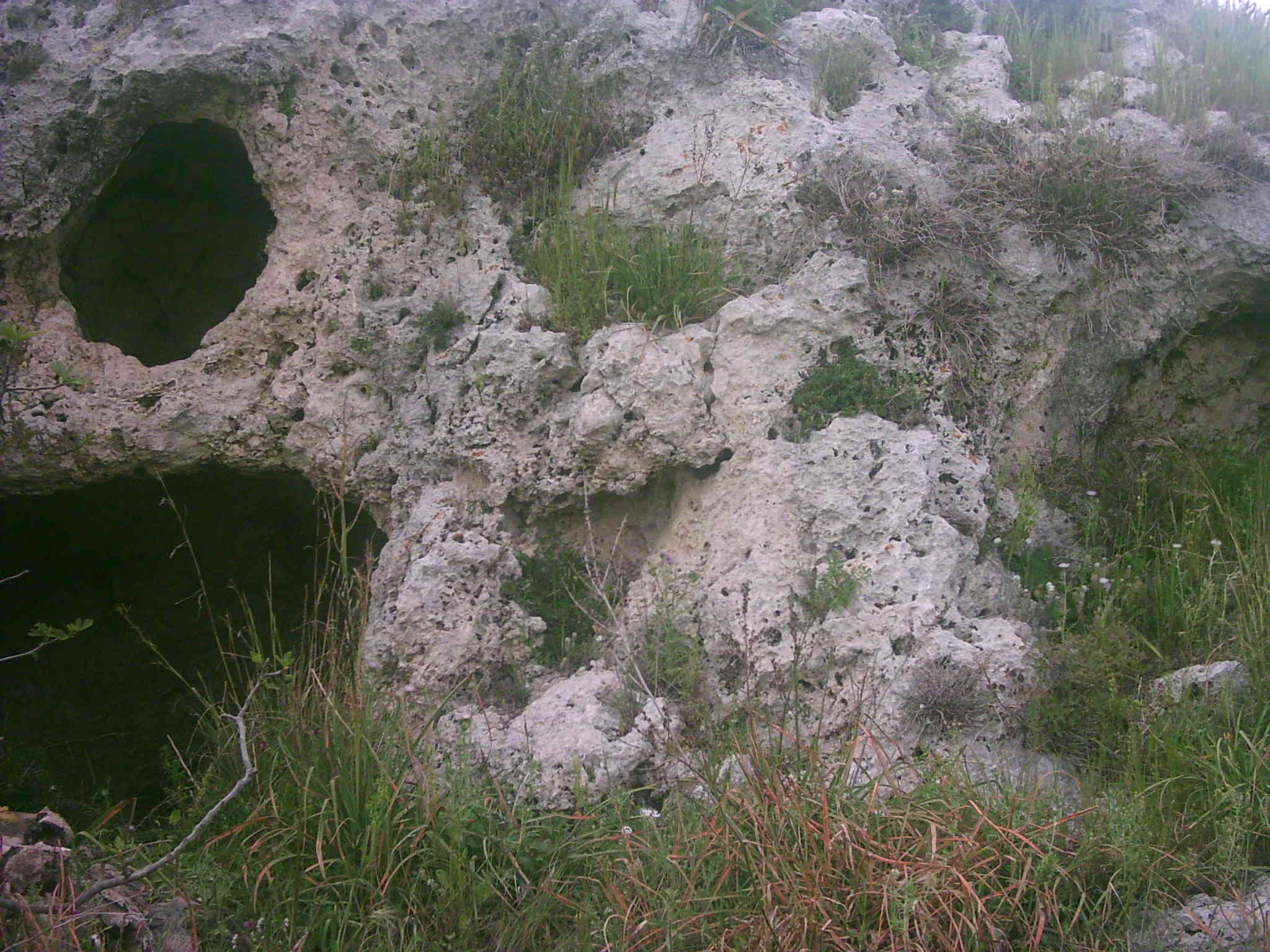 Riesi, caves